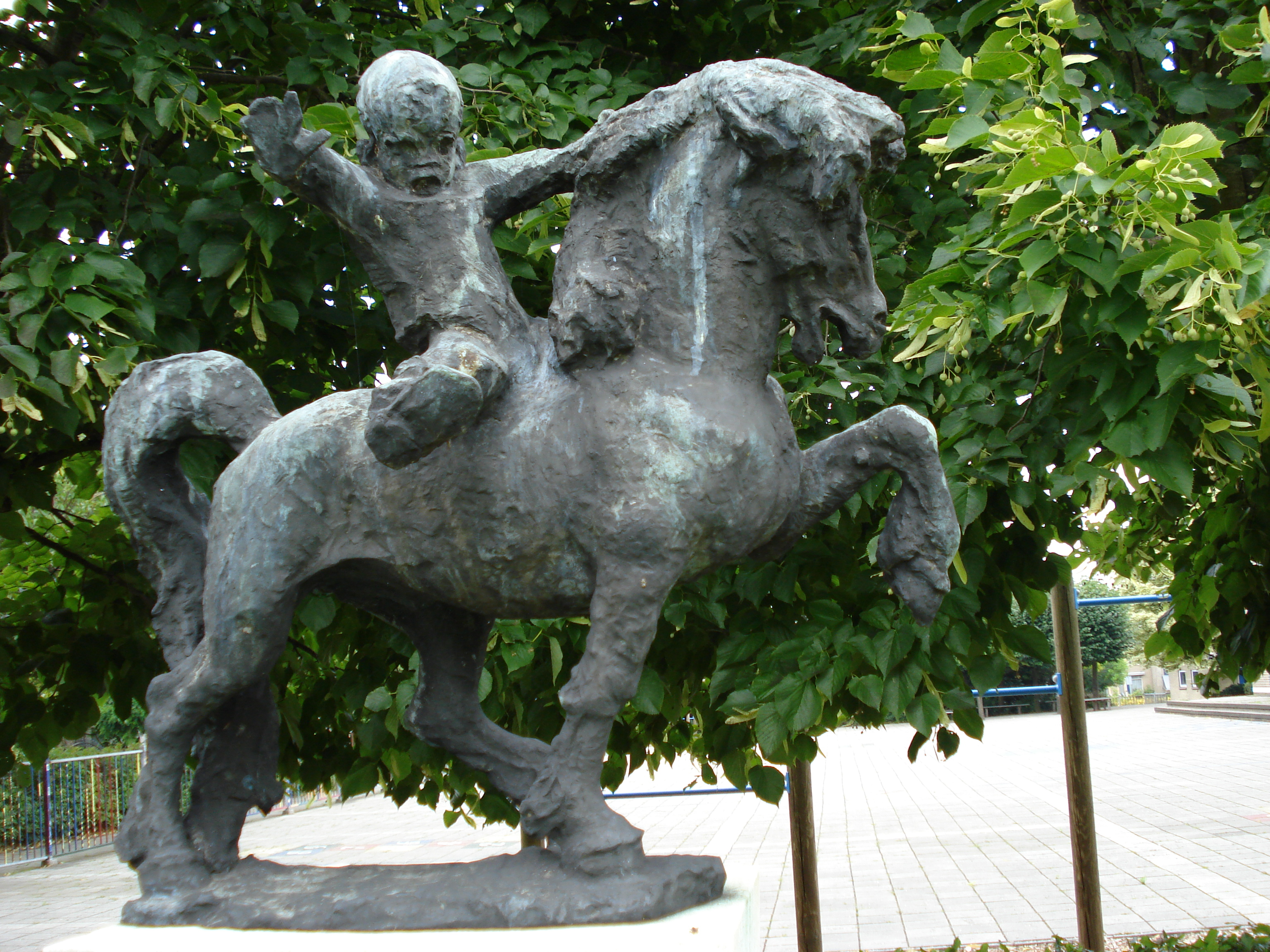 Mill, North Brabant, statuette devant l'école